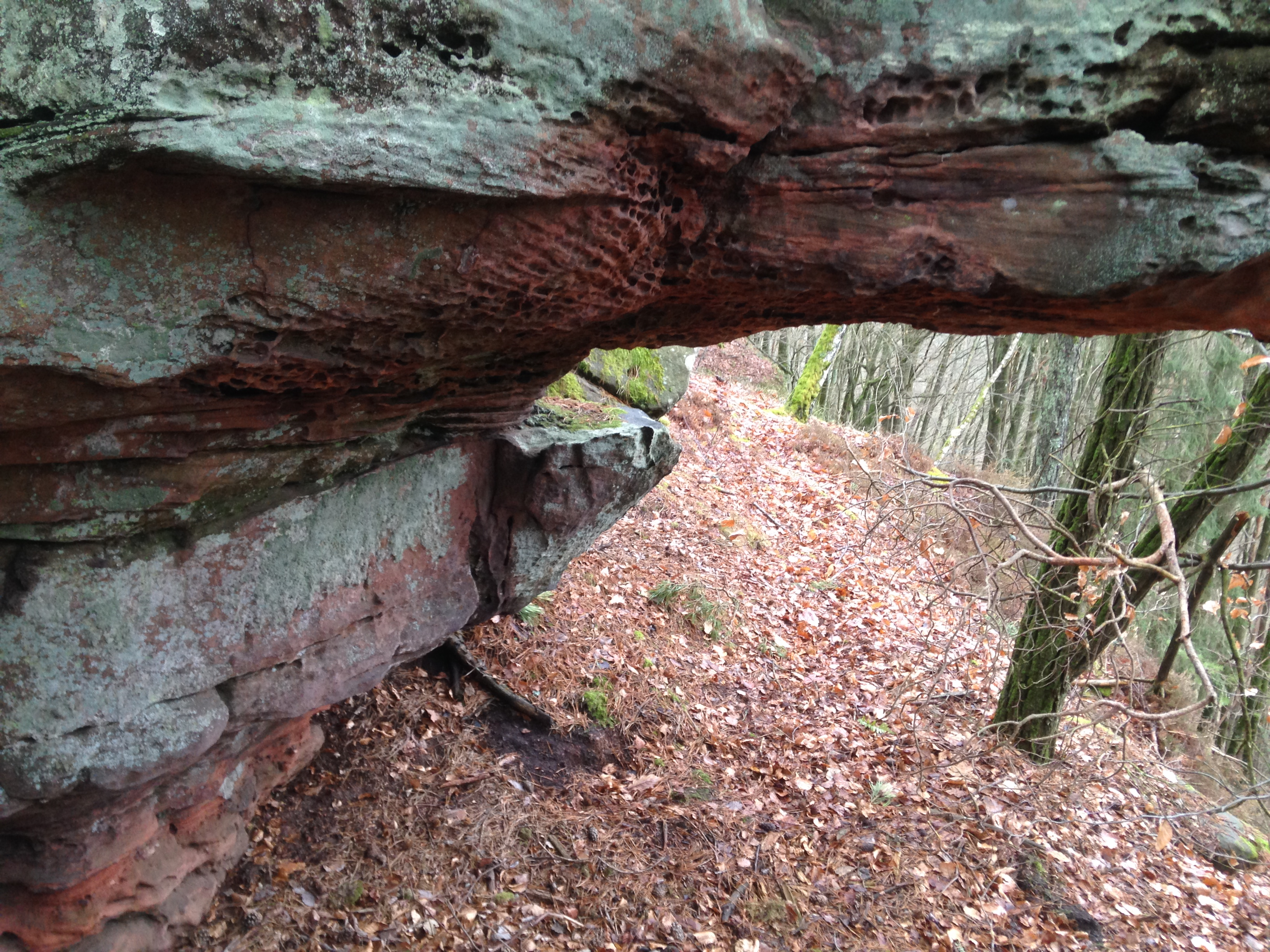 Seitlicher Rand der Heidelsburg